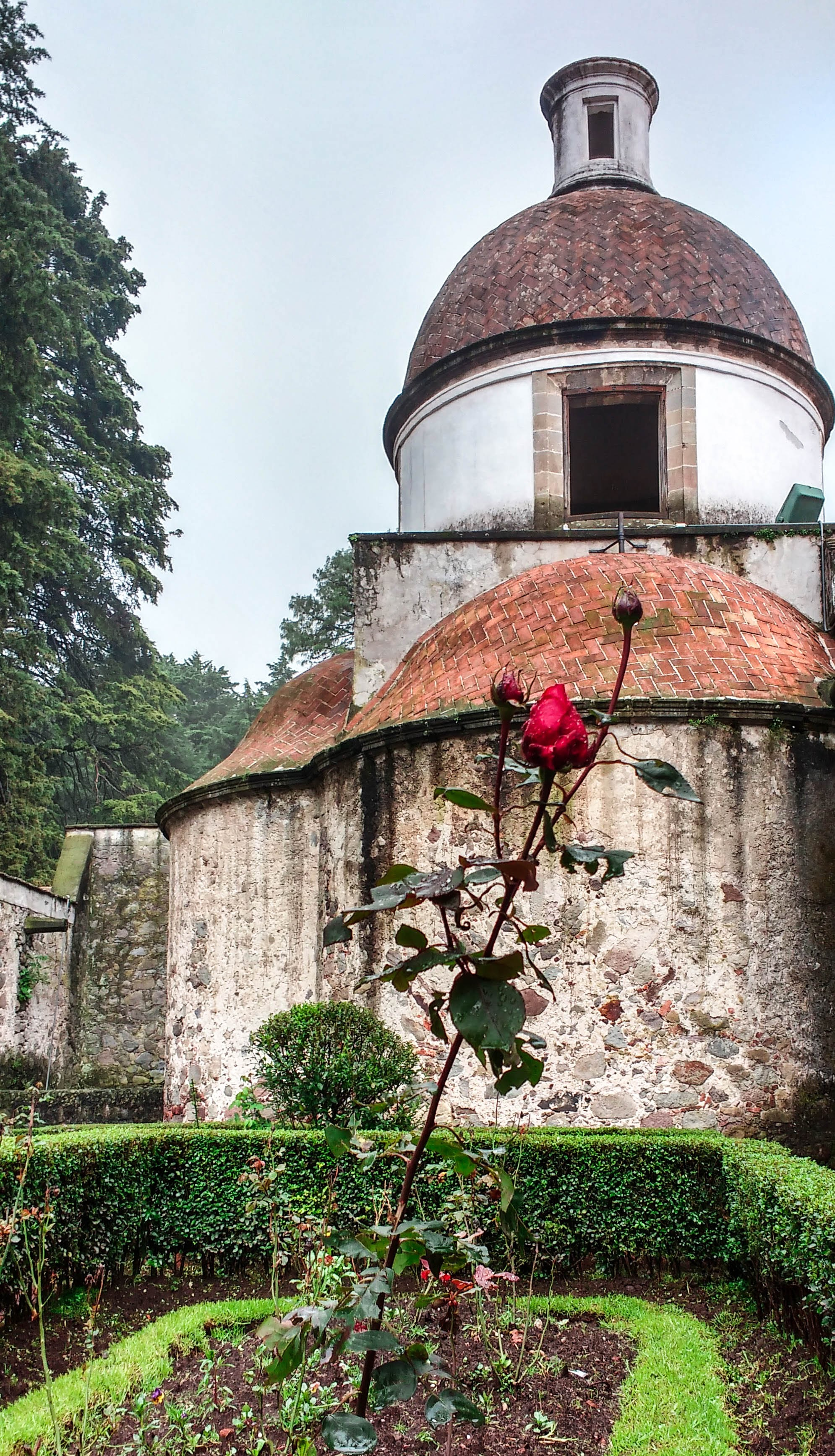 En primer plano tenemos la belleza de la naturaleza; enmarcada en la rosa que crece hacia el cielo. La cúpula en segundo plano, nos recuerda la vida de reflexión y sobriedad que tenían los monjes.